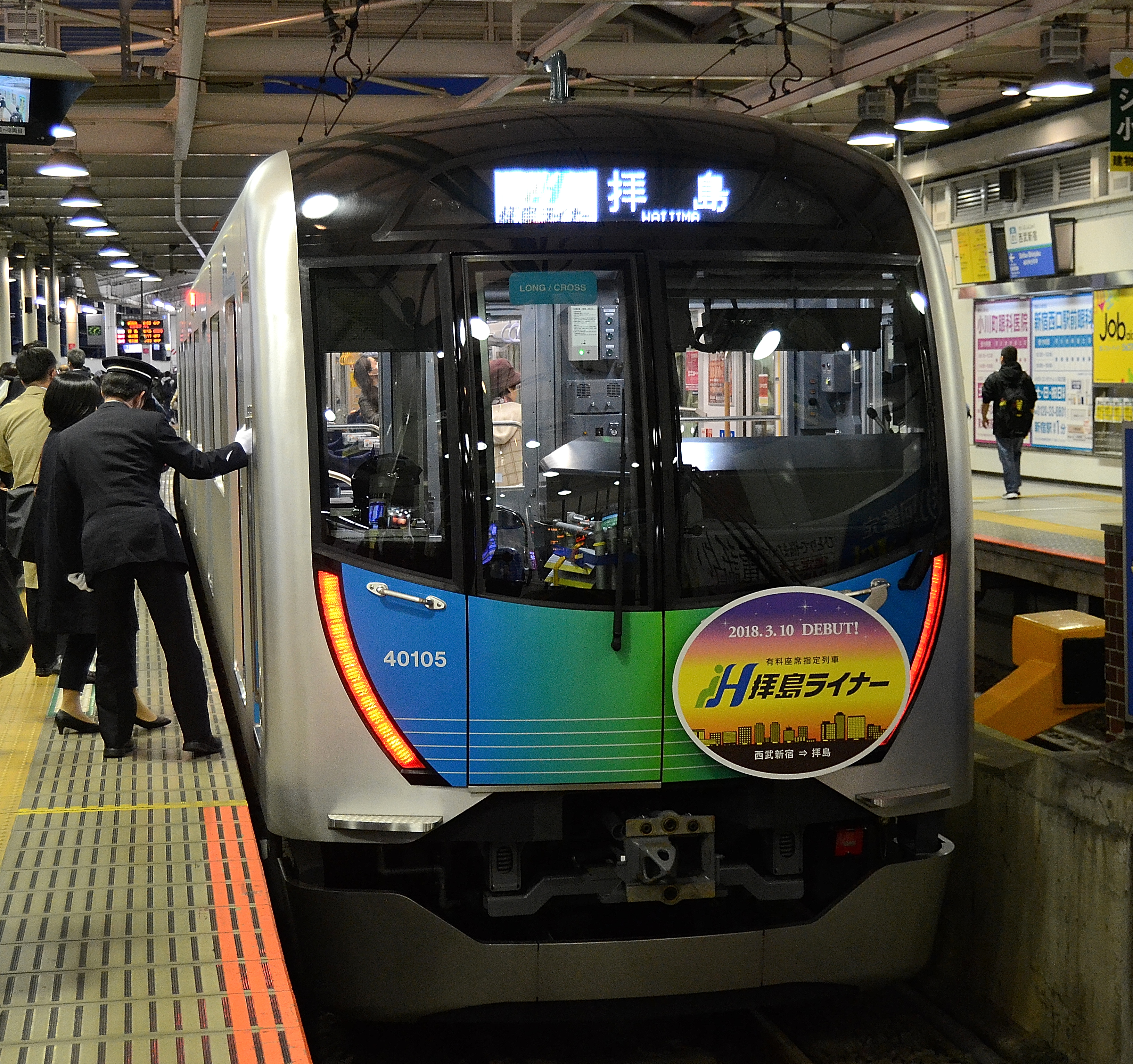 西武新宿線、西武新宿駅2番ホームに停車中の西武40000系の「拝島ライナー」